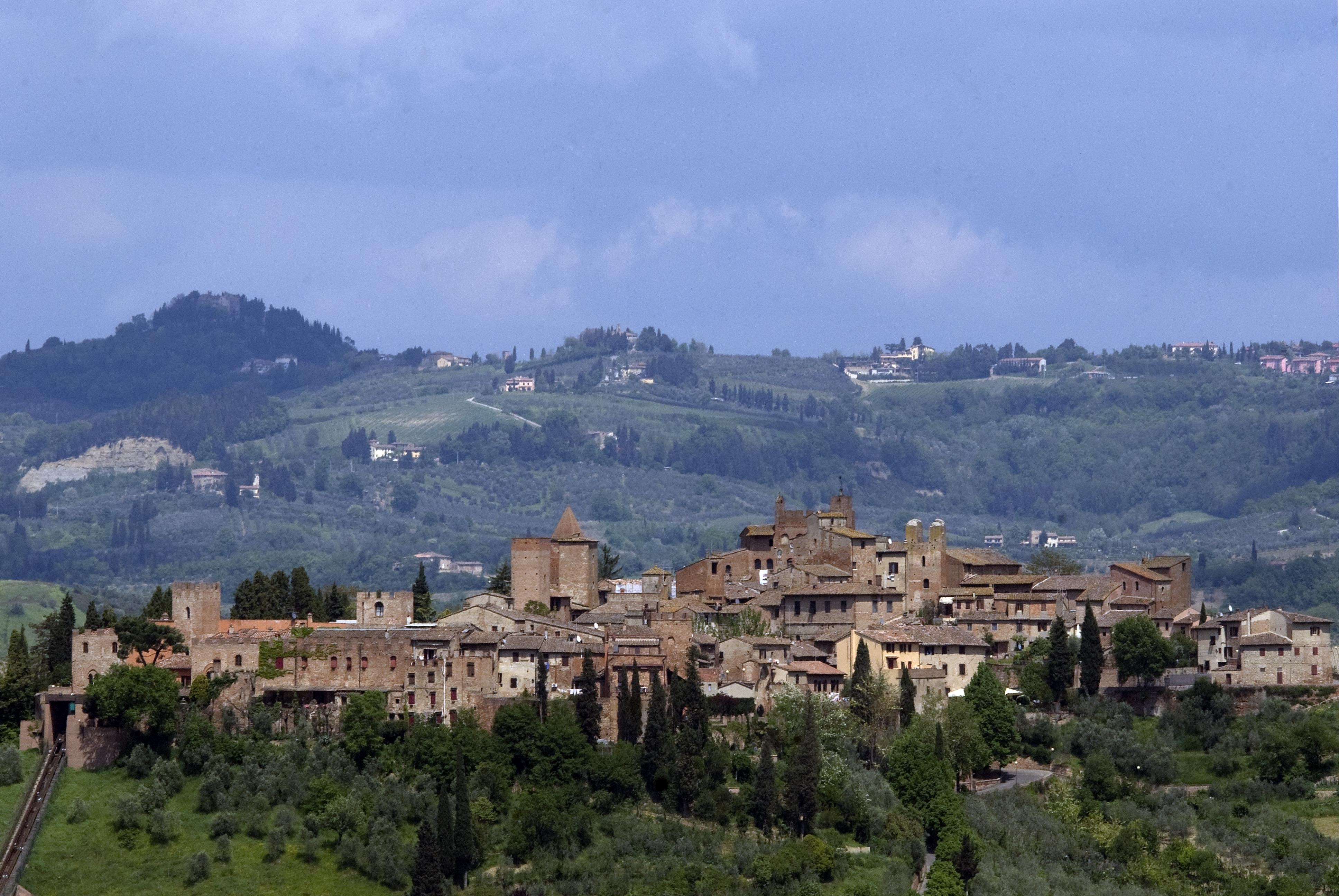 Panorama di Certaldo Alta